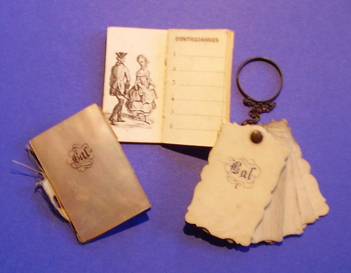 Collection privée